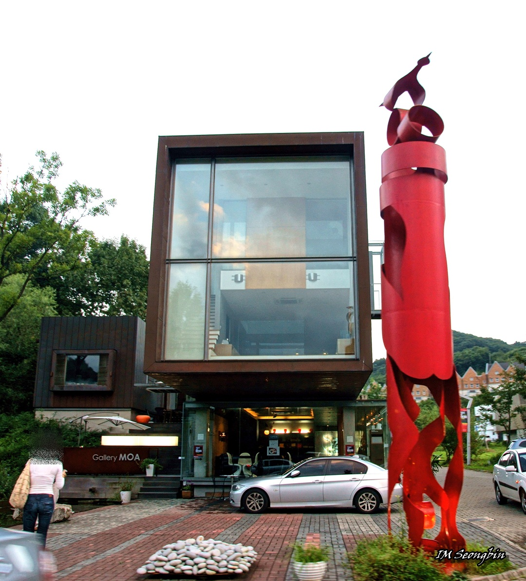 Gallery MOA, Heyri, Paju (갤러리 모아, 헤이리)